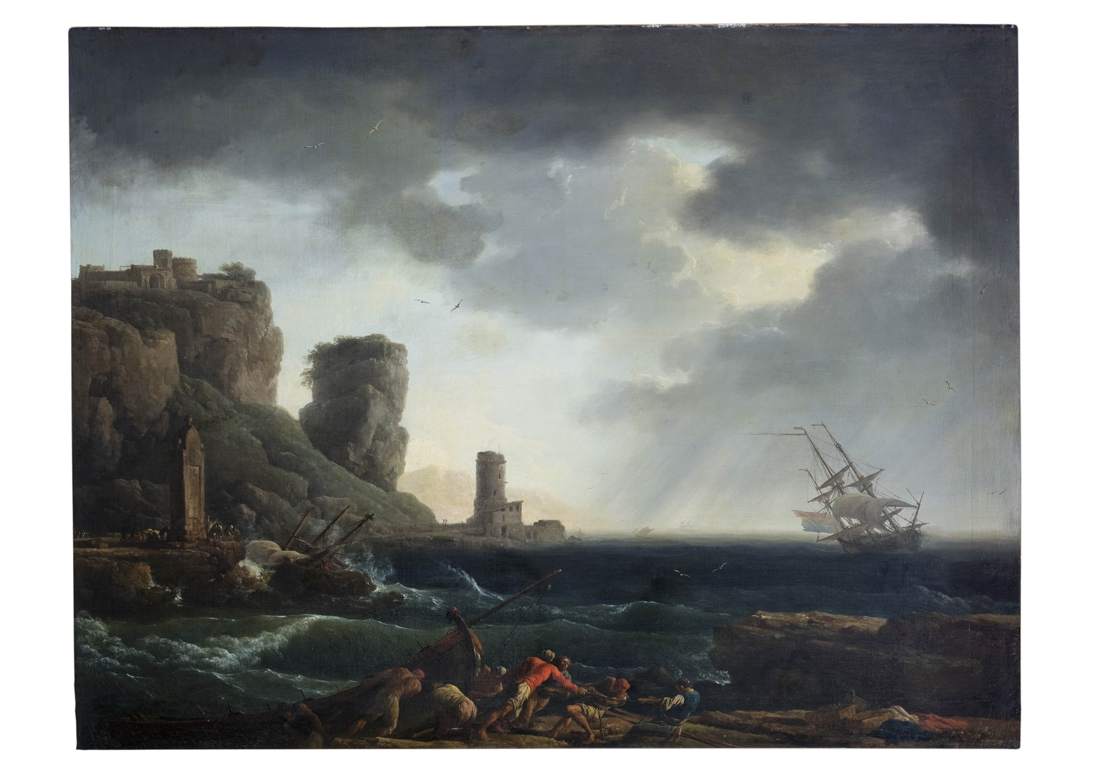 Claude Joseph Vernet, Pêcheurs remontant une barque par gros temps, 1747, huile sur toile, 73 × 96 cm, coll. particulière, Paris